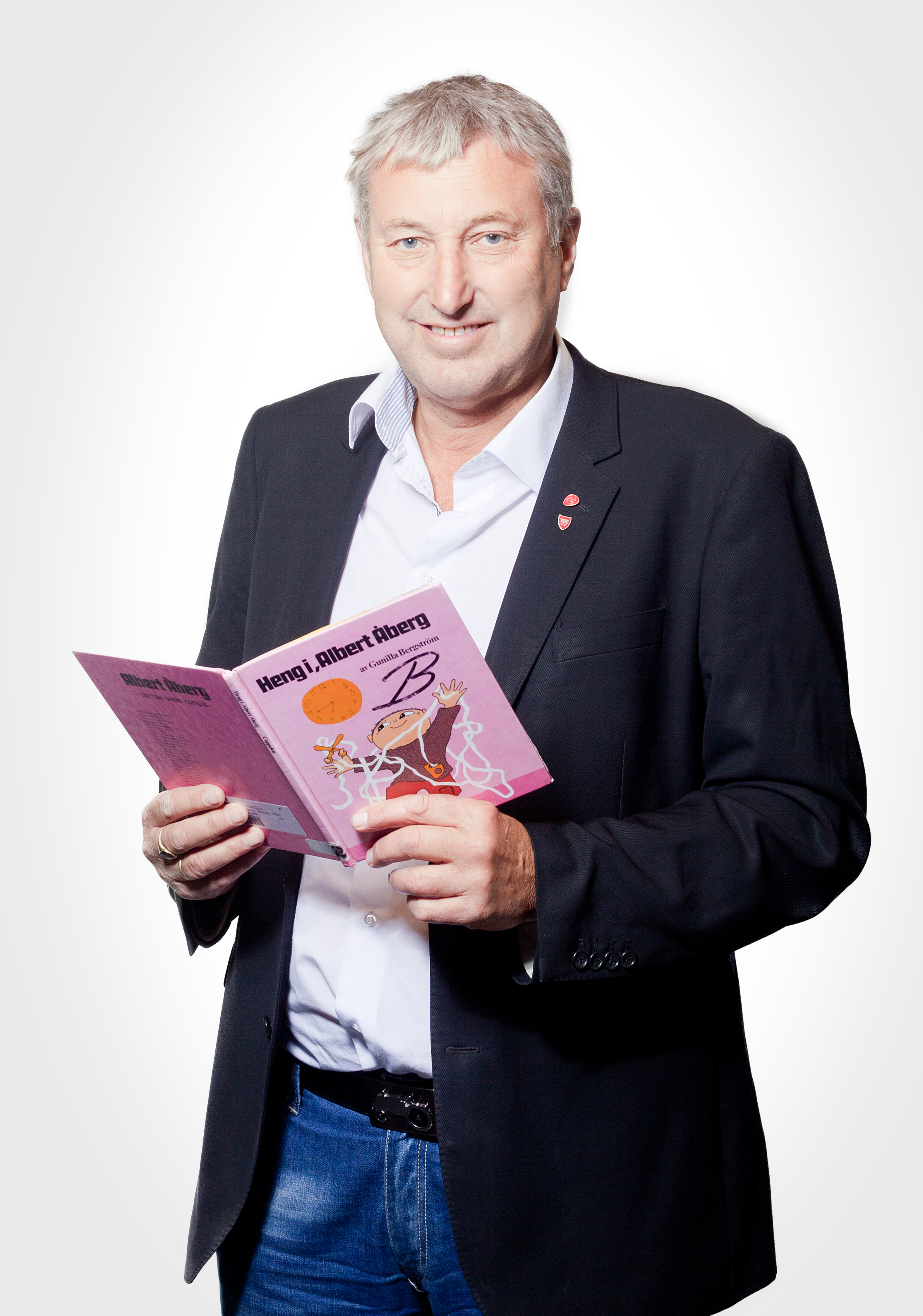 Ordfører Bård Langsåvold fra Meråker, Nord-Trøndelag. Bildet er tatt i forbindelse med Nord-Trøndelag fylkesbiblioteks kampanje "Leseambassadører"